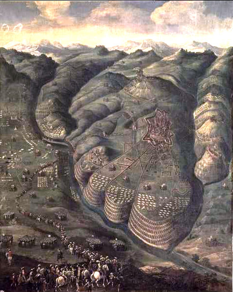 Prise_de_Privas_Louis_XIII_et_le_cardinal_de_Richelieu_entrant_dans_la_ville_occupee_par_Saint-Andre-Montbrun_le_28_mai_1629.